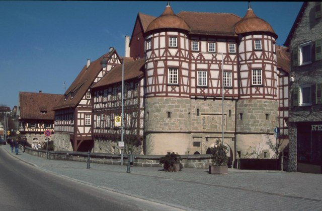 Das alte Schloss - Gaildorf